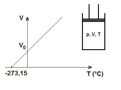 Rappresentazione grafica della 1° Legge di Gay Lussac (libro di chimica-fisica).